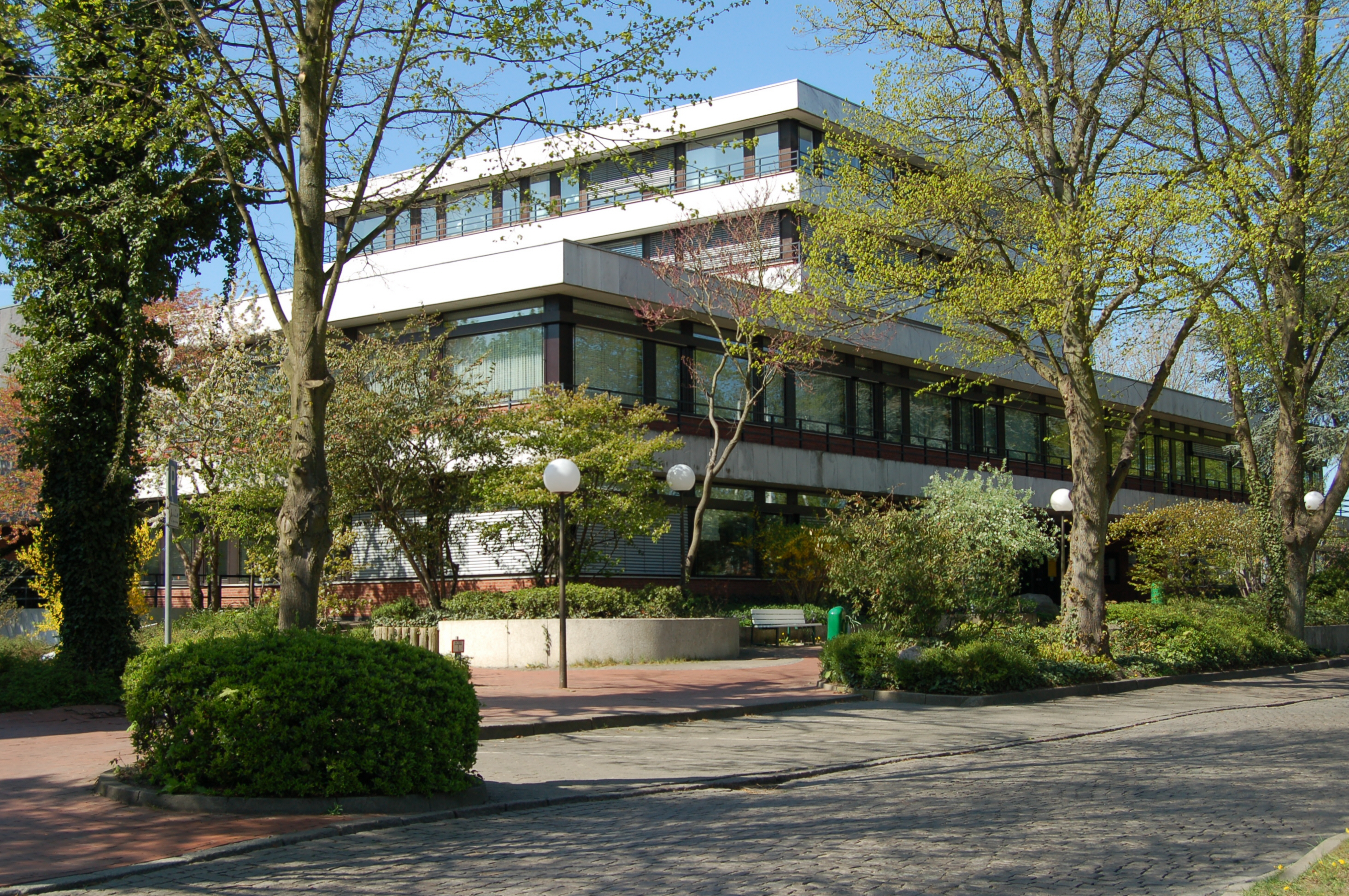 Das Uetersener Rathaus aus dem Jahr 1977